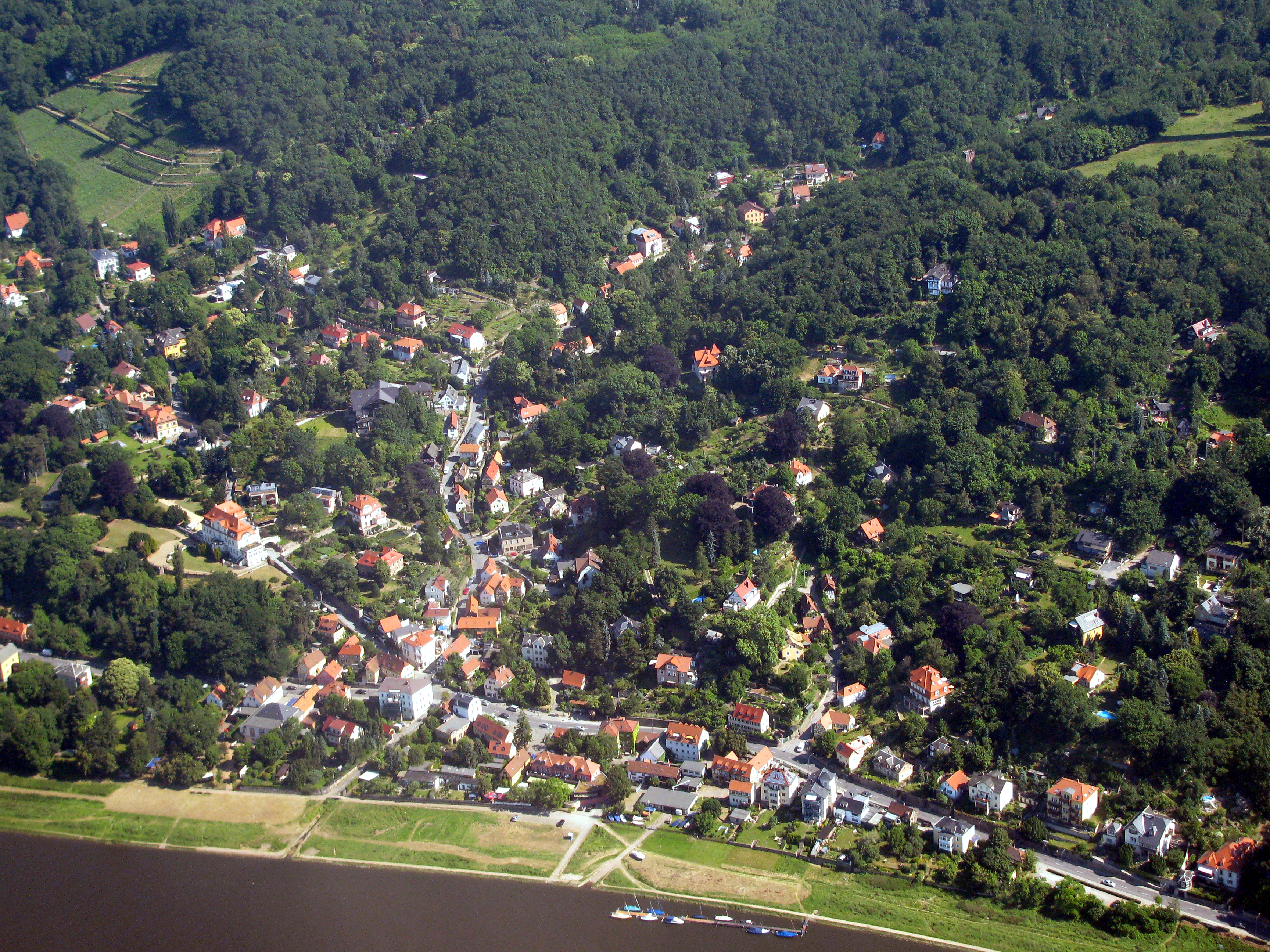 Luftbild Wachwitz